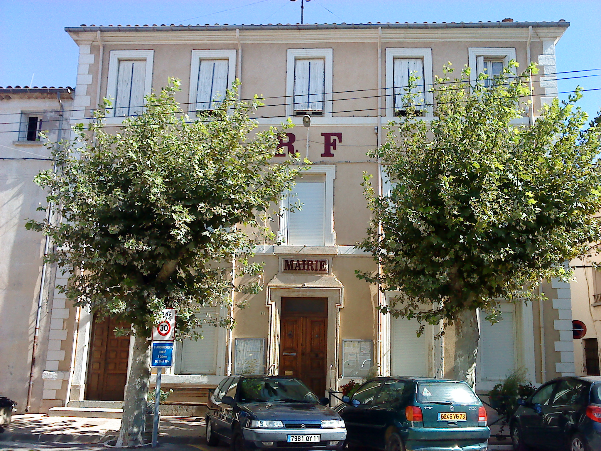 Mairie de Névian (Aude, France)